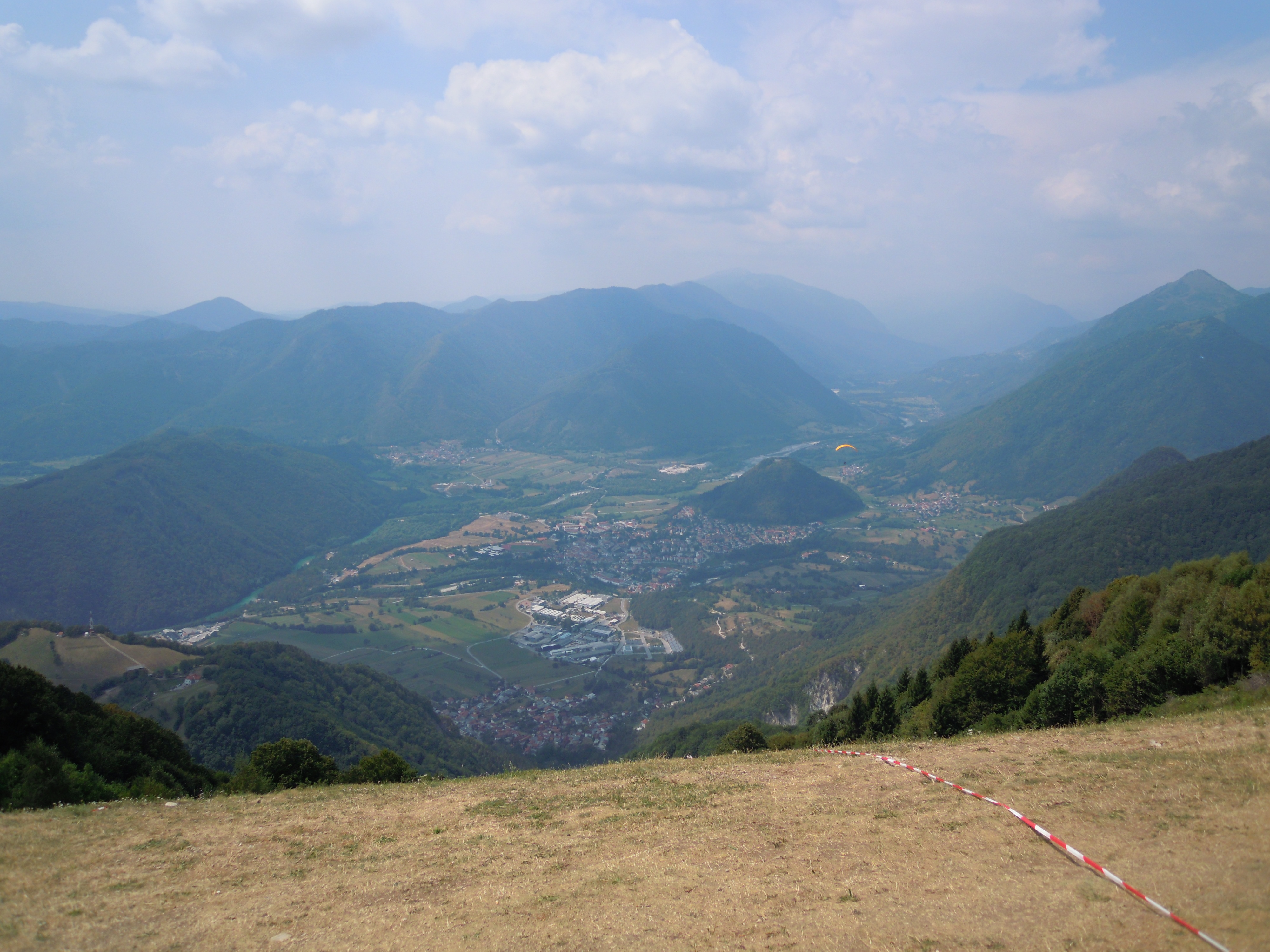 Kobala.